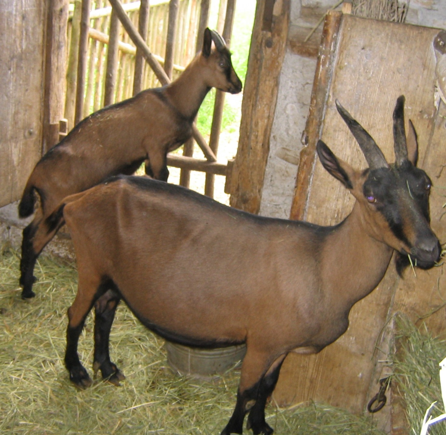 Bunte Deutsche Edelziegen im Freilichtmuseum Neuhausen ob Eck